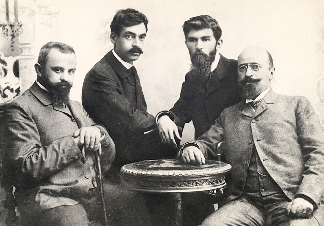 Пенчо Славейков, Пейо Яворов, Петко Тодоров, Кръстьо Кръстев